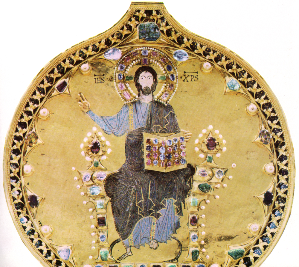 Pala d'oro, cristo in smalto al centro